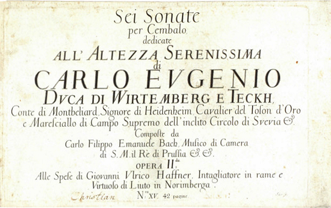 Frontispício da edição das Seis Sonatas para Teclado (Württembergische Sonaten“) Wq 49